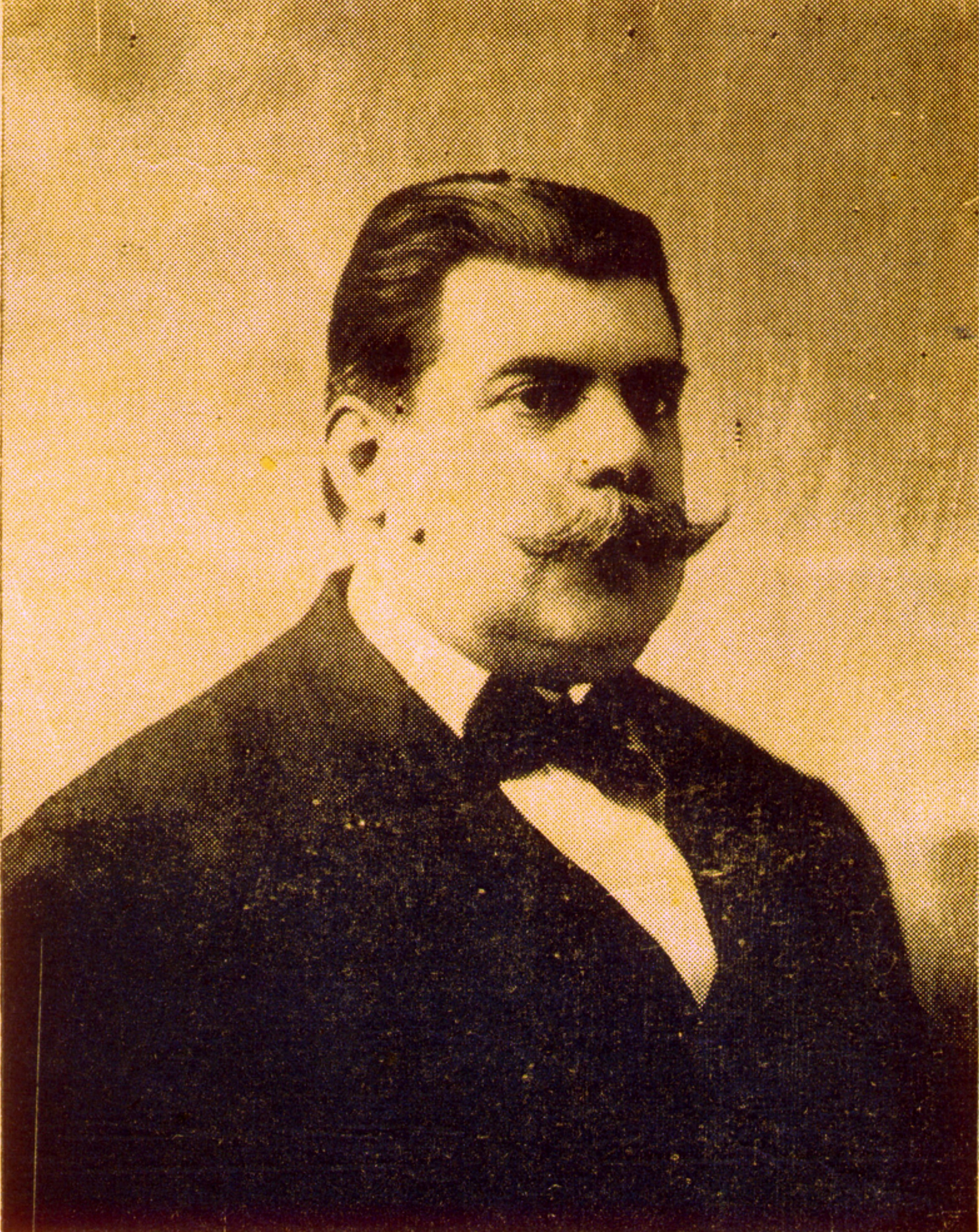 Retrato fotográfico de Julio Cecilio Perrando - Circa 1915